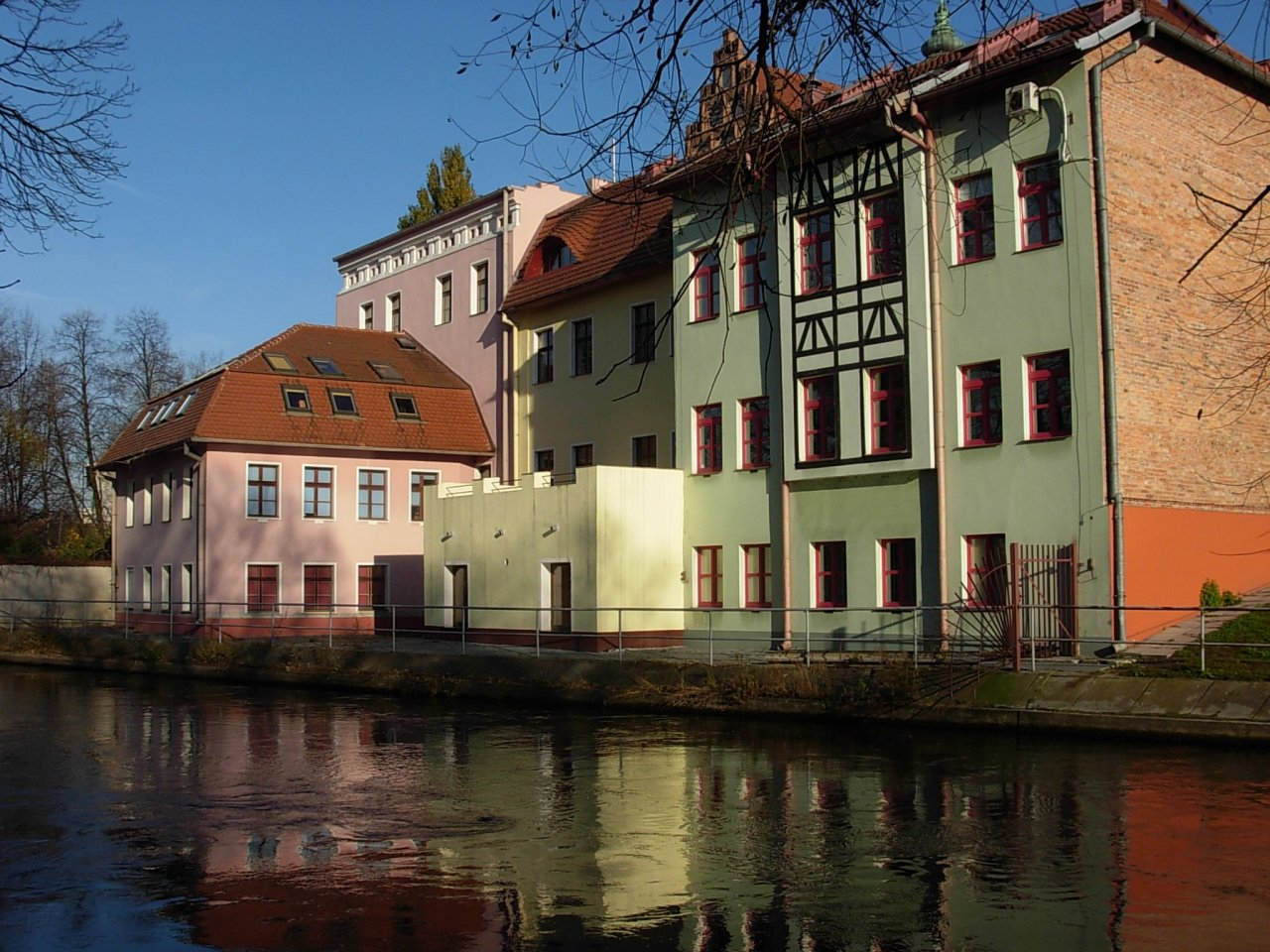 Nowa zabudowa Wenecji Bydgoskiej przy ul. Przyrzecze